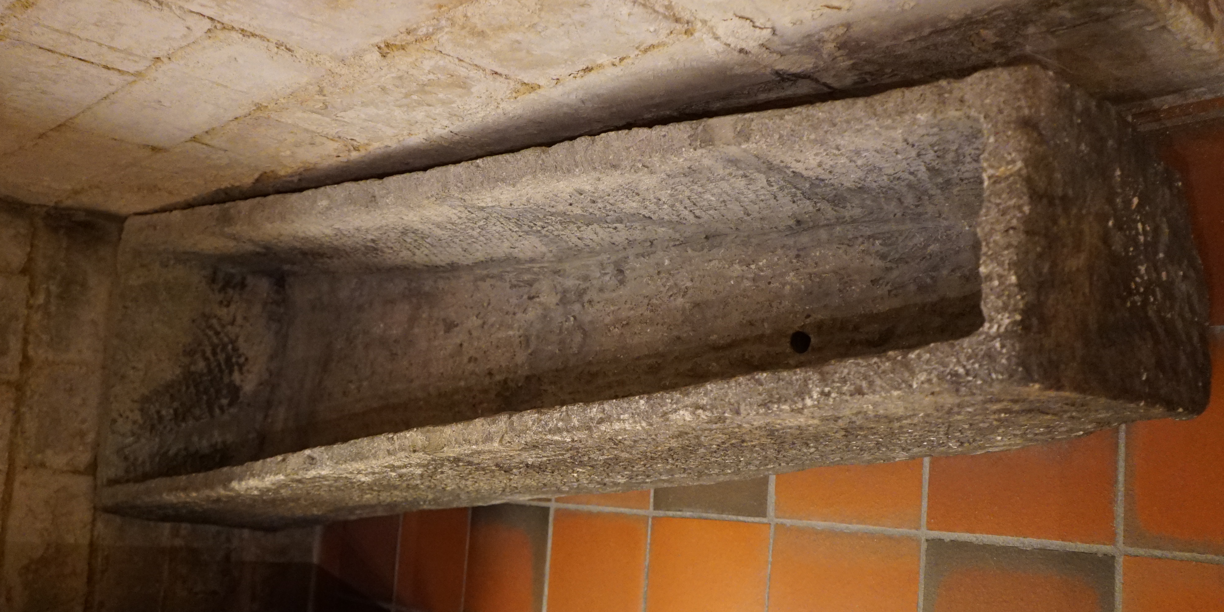 salle du sous-sol du musée st-Loup.